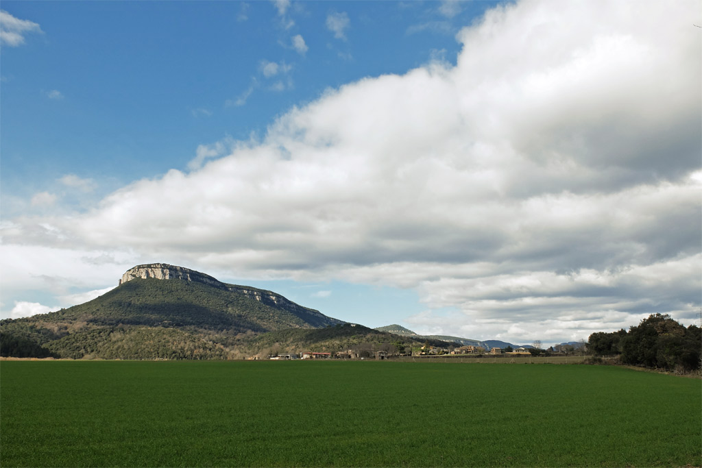 Sant Roc i el Pla de Sant Joan. Municipi de Sant Martí de Llémena